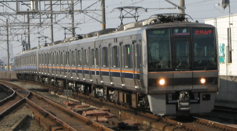 帯色の変更が進むJR西日本207系。